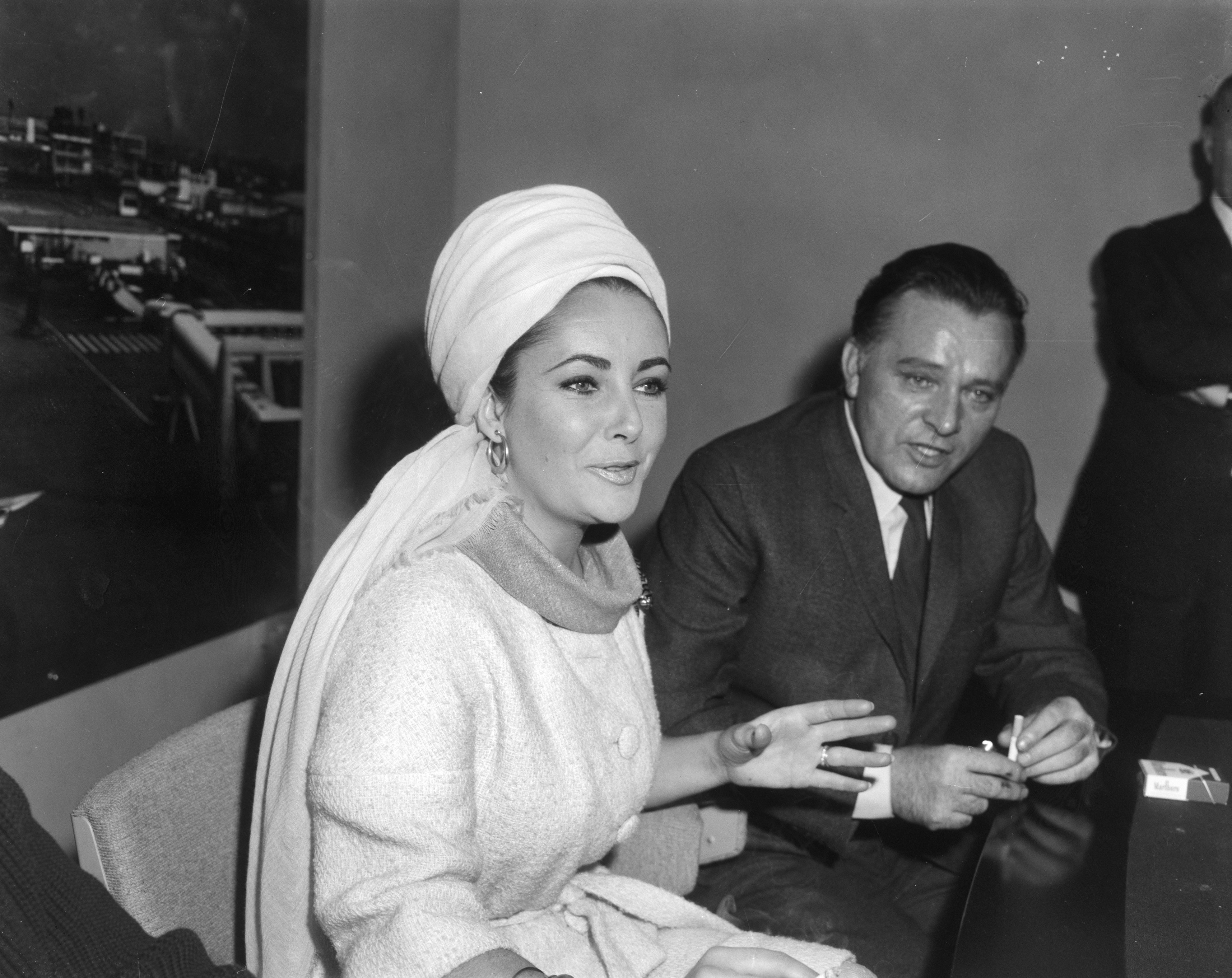 Collectie / Archief : Fotocollectie Anefo Reportage / Serie : [ onbekend ] Beschrijving : Liz Taylor en Richard Burton tijdens persconferentie op Schiphol [betreft film "The spy who came in from the cold", waarin Richard Burton de hoofdrol speelde, red.] Datum : 26 april 1965 Locatie : Noord-Holland, Schiphol Trefwoorden : acteurs, actrices, filmsterren, persconferenties, vliegvelden Persoonsnaam : Burton, Richard, Taylor, Elizabeth Fotograaf : Bilsen, Joop van / Anefo, [onbekend] Auteursrechthebbende : Nationaal Archief Materiaalsoort : Negatief (zwart/wit) Nummer archiefinventaris : bekijk toegang 2.24.01.04 Bestanddeelnummer : 917-6940